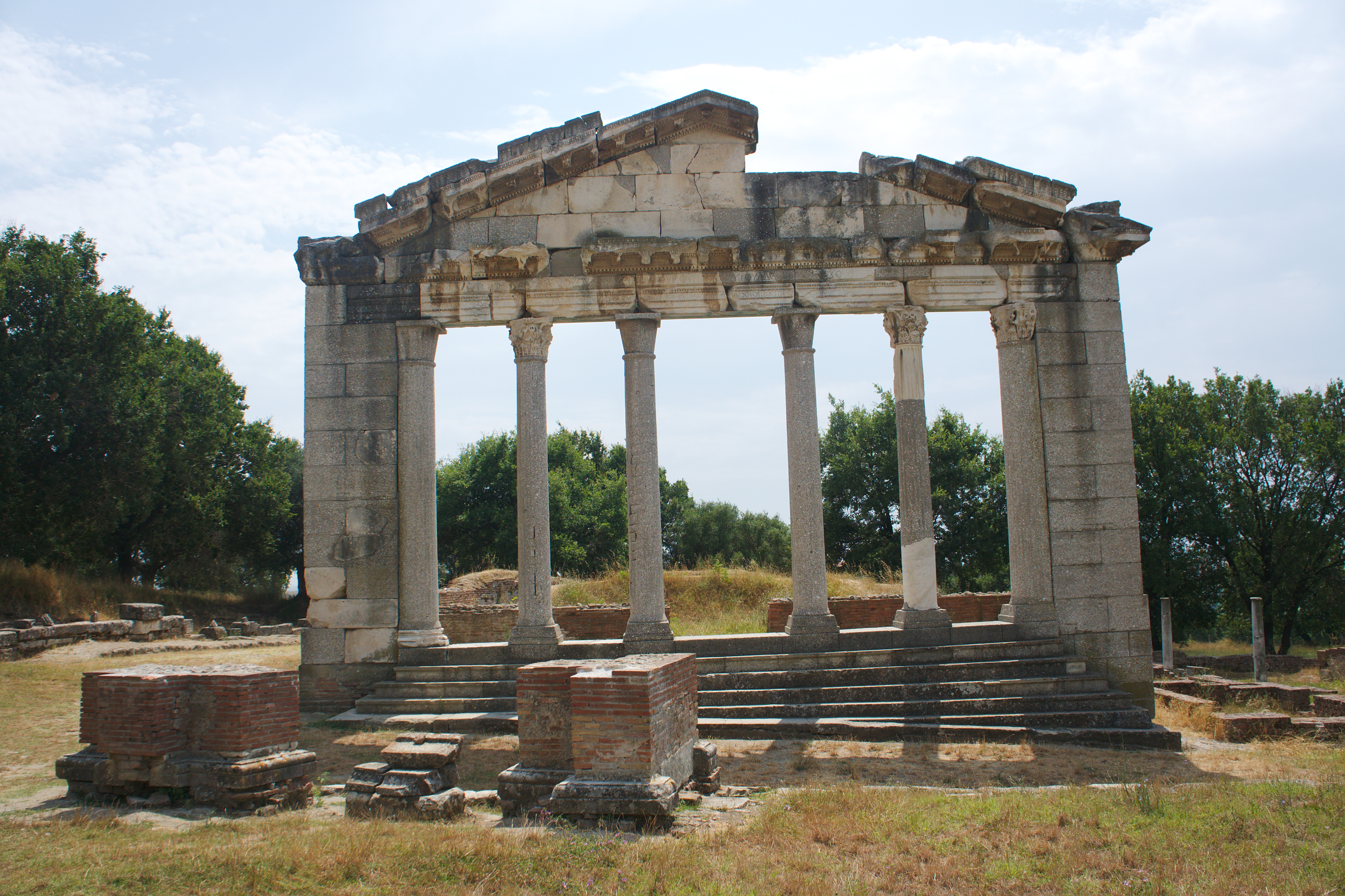 Bouleterion d'Apollonie d'Illyrie (Appolonia) en Albanie.